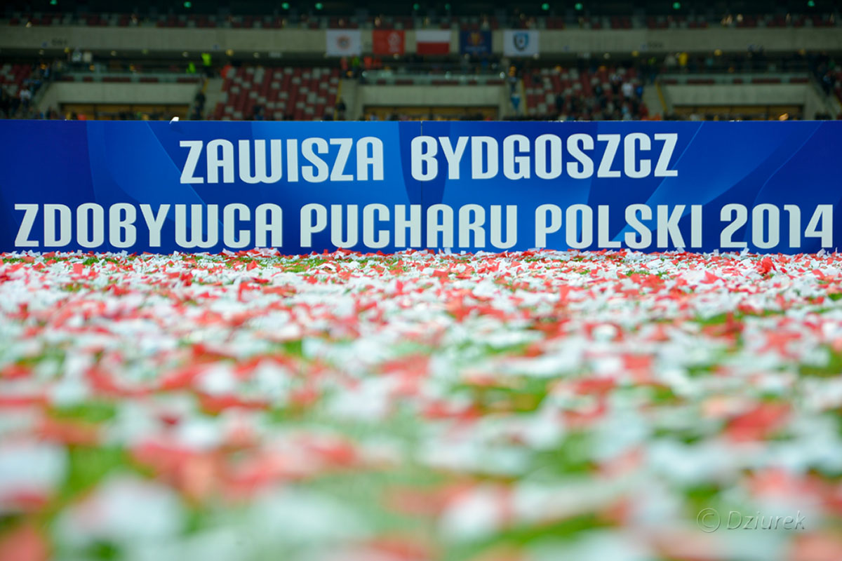 02.05.2014 Warszawa , final Pucharu Polski mecz KGHM Zaglebie Lubin - Zawisza Bydgoszcz , n/z boisko po fecie fot. P. Dziurman